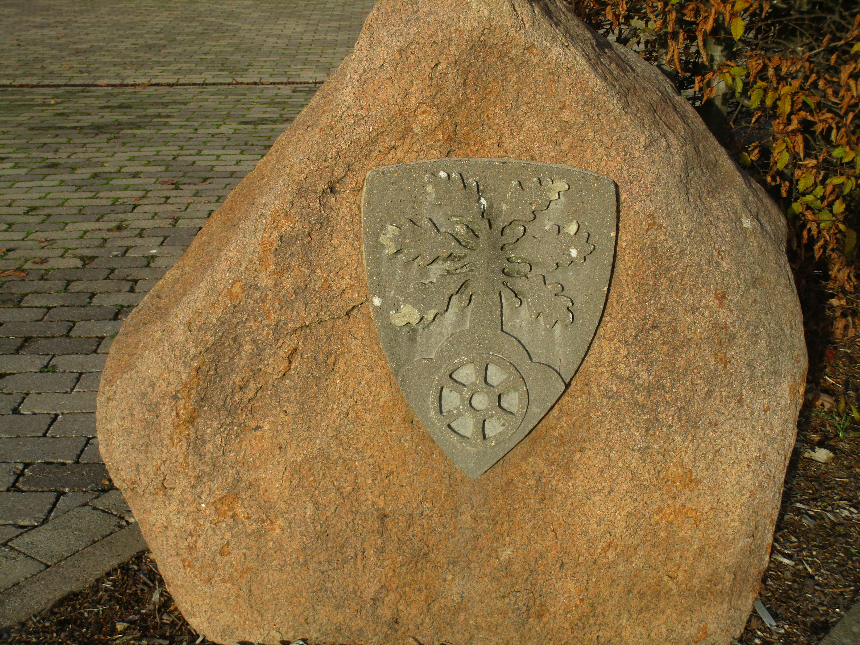 Szenen in Hunteburg … Wappen von Hunteburg am Haus der Feuerwehr.